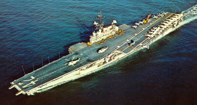 USS Franklin D. Roosevelt (CVA-42) nach kleiner SCB-101.66